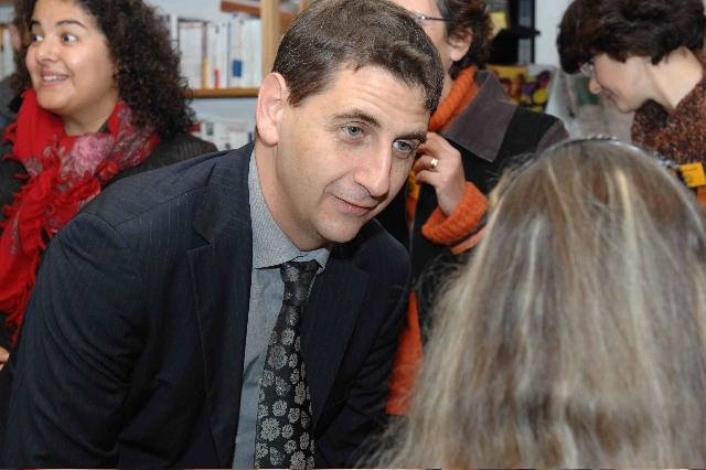 Le député Daniel Goldbeg à Aubervillers en octobre 2009